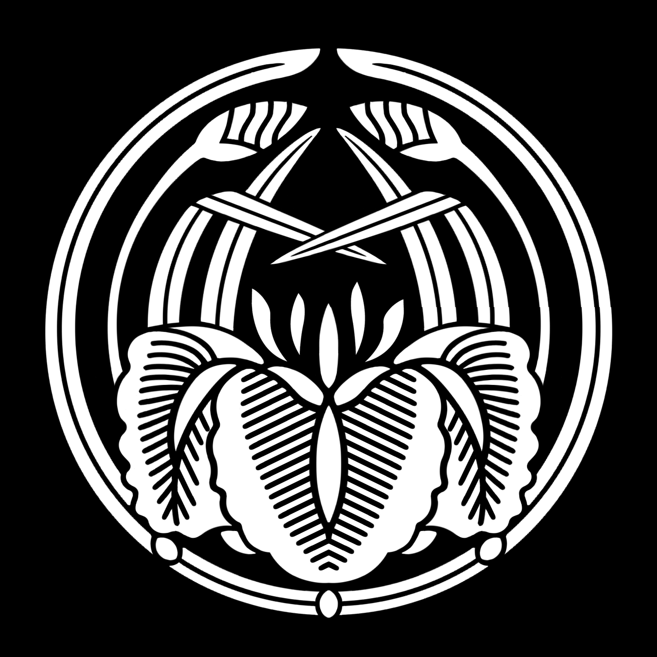 「杏葉杜若」紋（染抜）